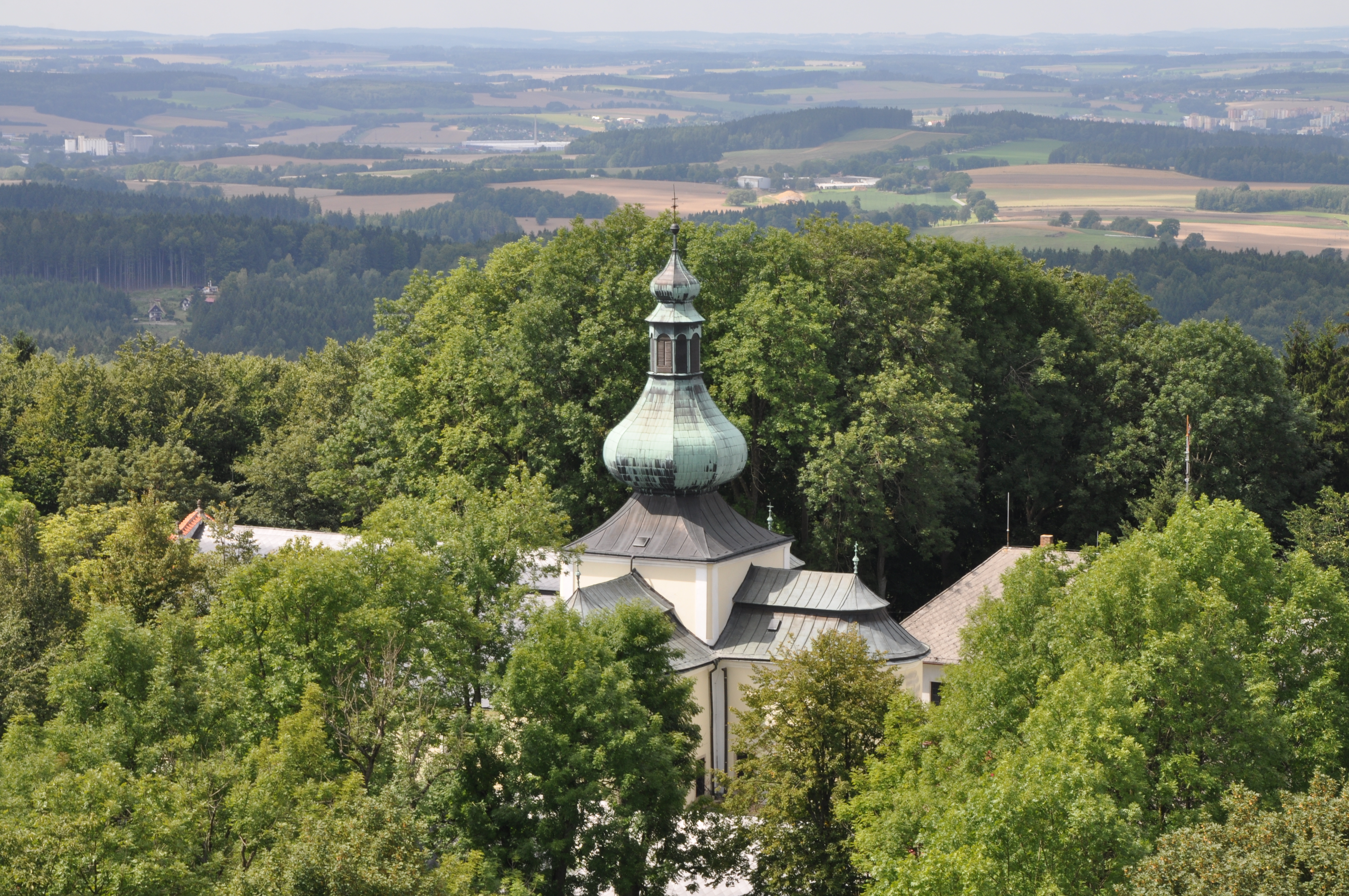 Pohled z věže rozhledny Pípalka na areál kostela Nejsvětější Trojice a okolí Křemešníku.